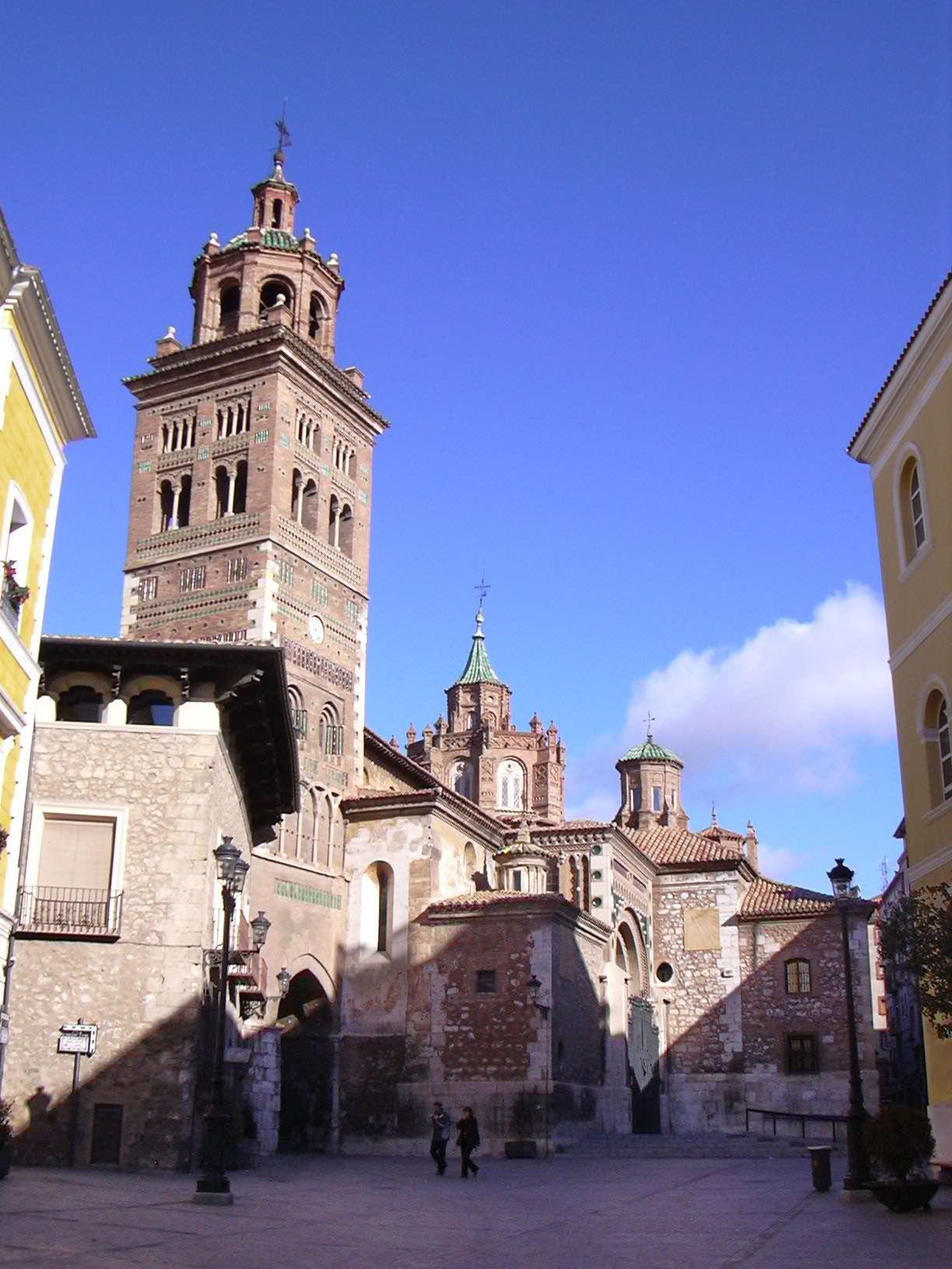 Teruel - Fachada de la catedral